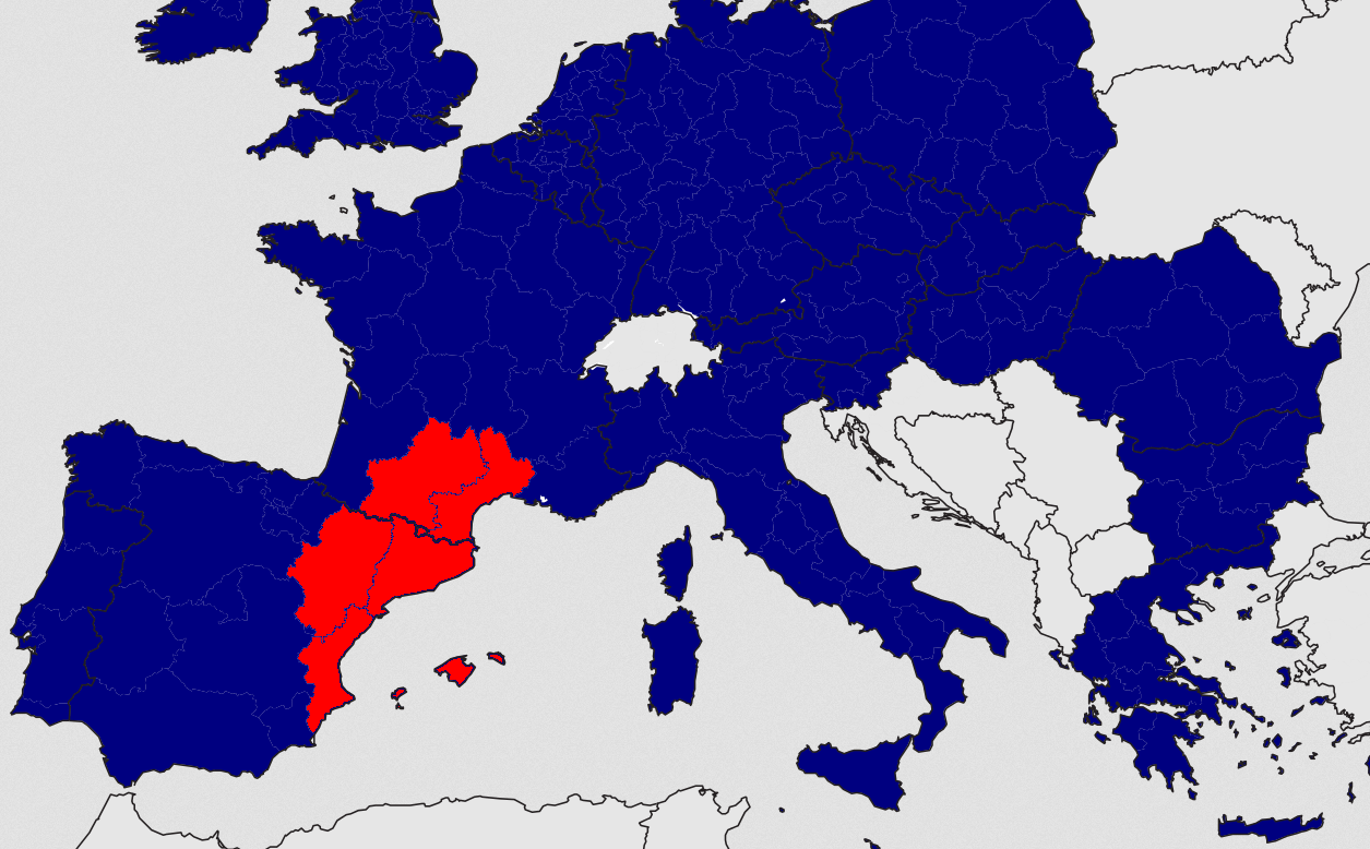 Propuesta inicial de Eurorregión Pirineos Mediterráneo de 2003. El mapa empleado como base es File:EU NUTS 2 Baltic states.svg